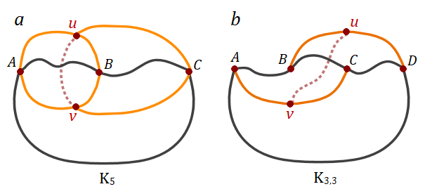 Reducció esquemàtica dels creuaments en grafs no planars